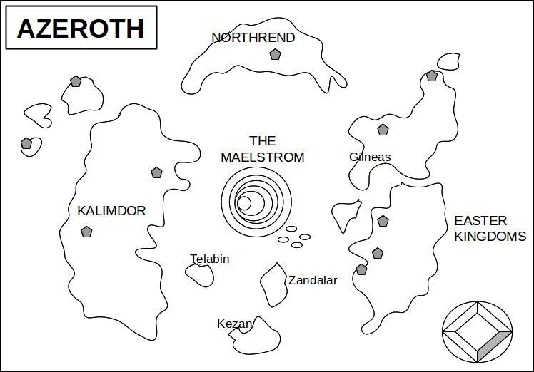 mapa del mundo ficticio de Azeroth, parte del universo donde están ambientados los videojuegos de la serie Warcraft.